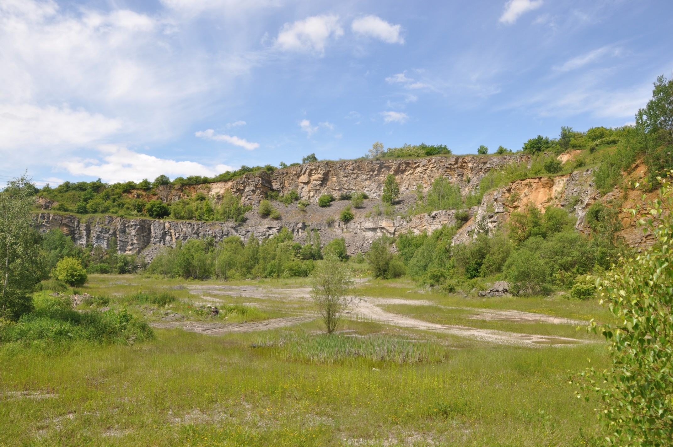 Novy Bily lom am Damil, Tetín u Berouna